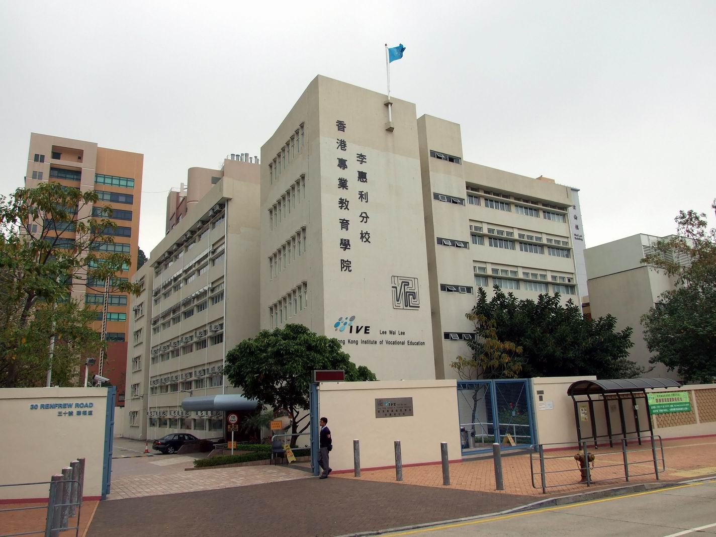 香港專業教育學院李惠利分校